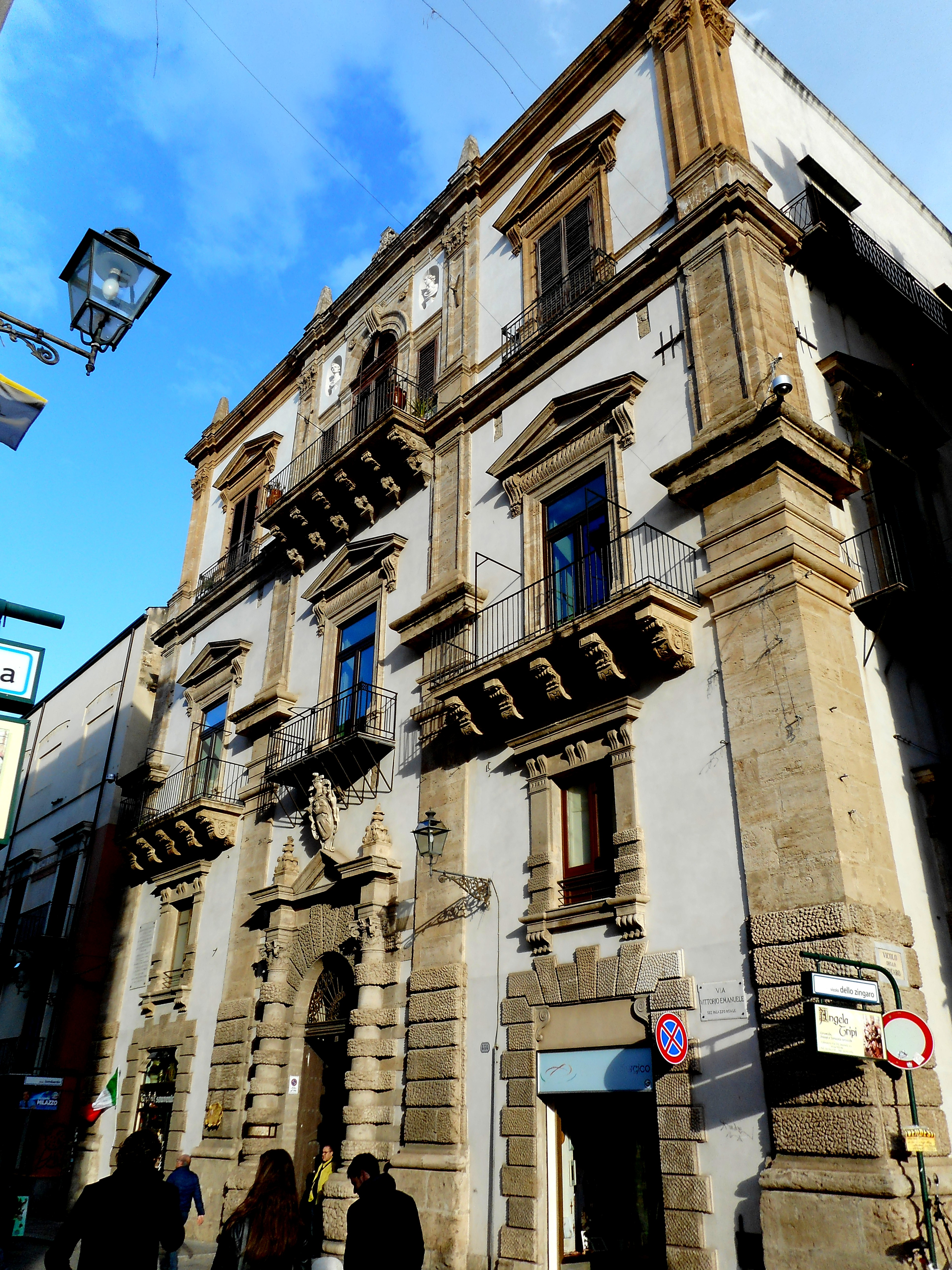 Facciata di Palazzo Castrone Santa Ninfa